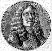 Medaille mit dem Brustbild Henrick Ruses, 1660.